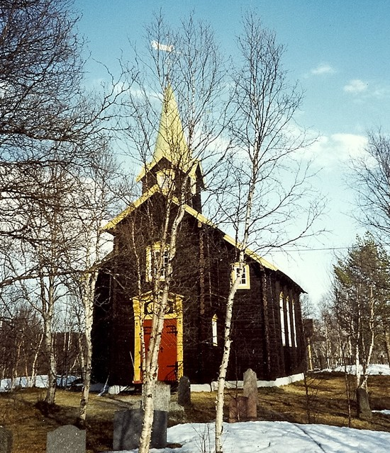 Hodalen kapell